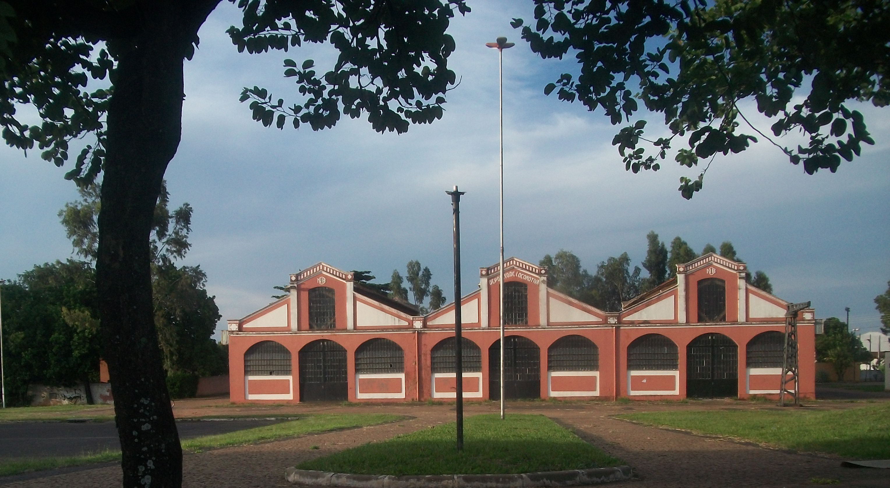 Centro Cultural Ferroviário. Patrimônio histórico de Araçatuba.